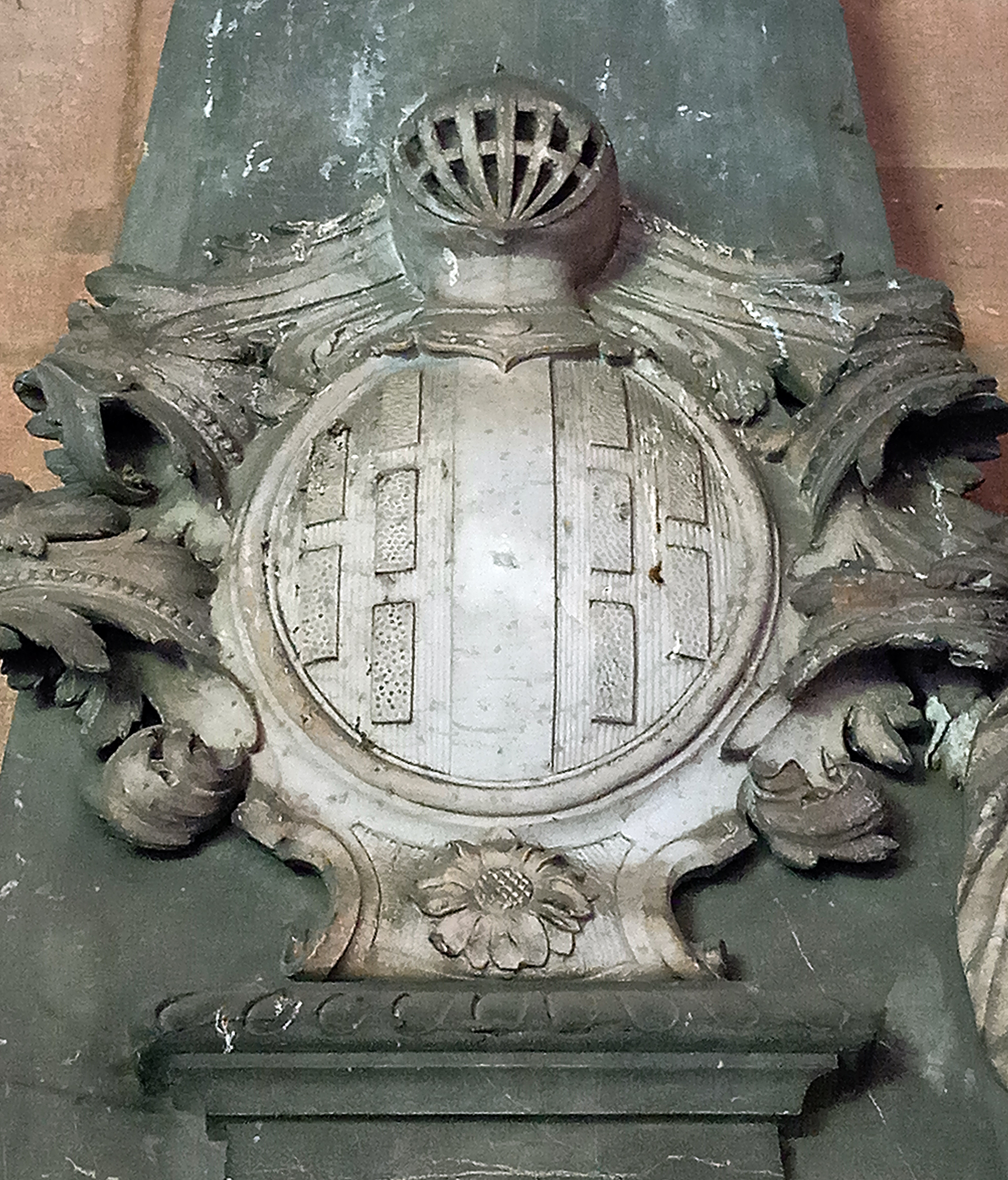 Familienwappen am Grabmal der Brüder Anselm Franz von Hoheneck (+ 1704) und Wilderich Marsilius von Hoheneck († 1735), beide Mainzer Generalvikare, Domkreuzgang Mainz